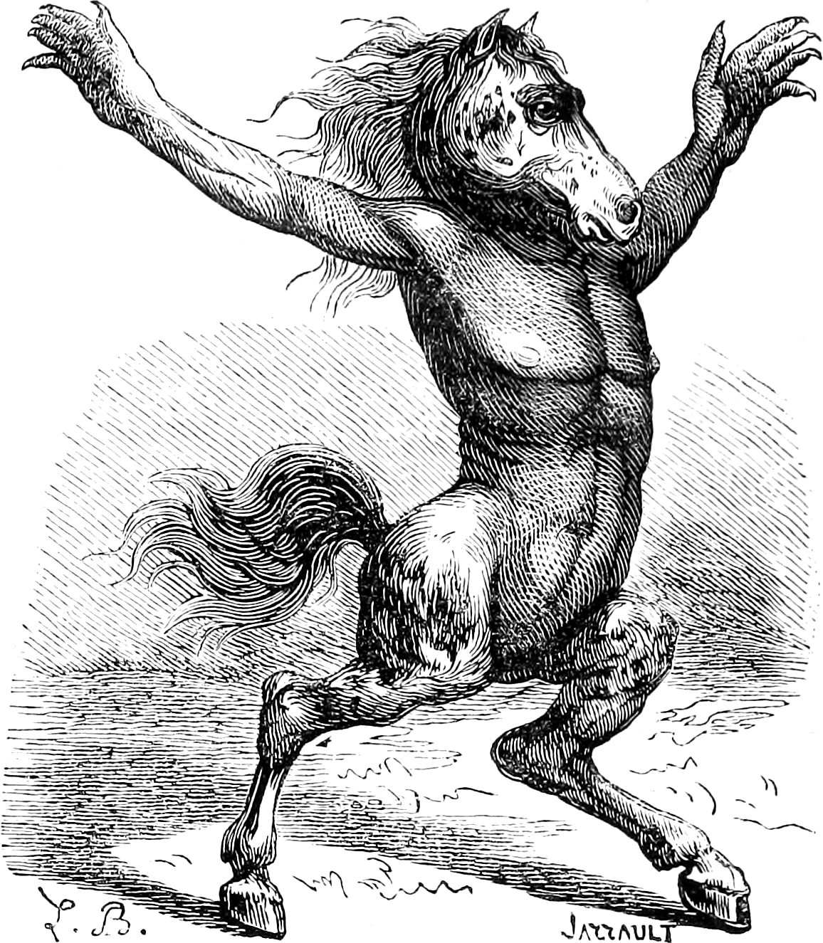 Une illustration pour l’article Orobas dans le Dictionnaire infernal par Collin de Plancy, 1863